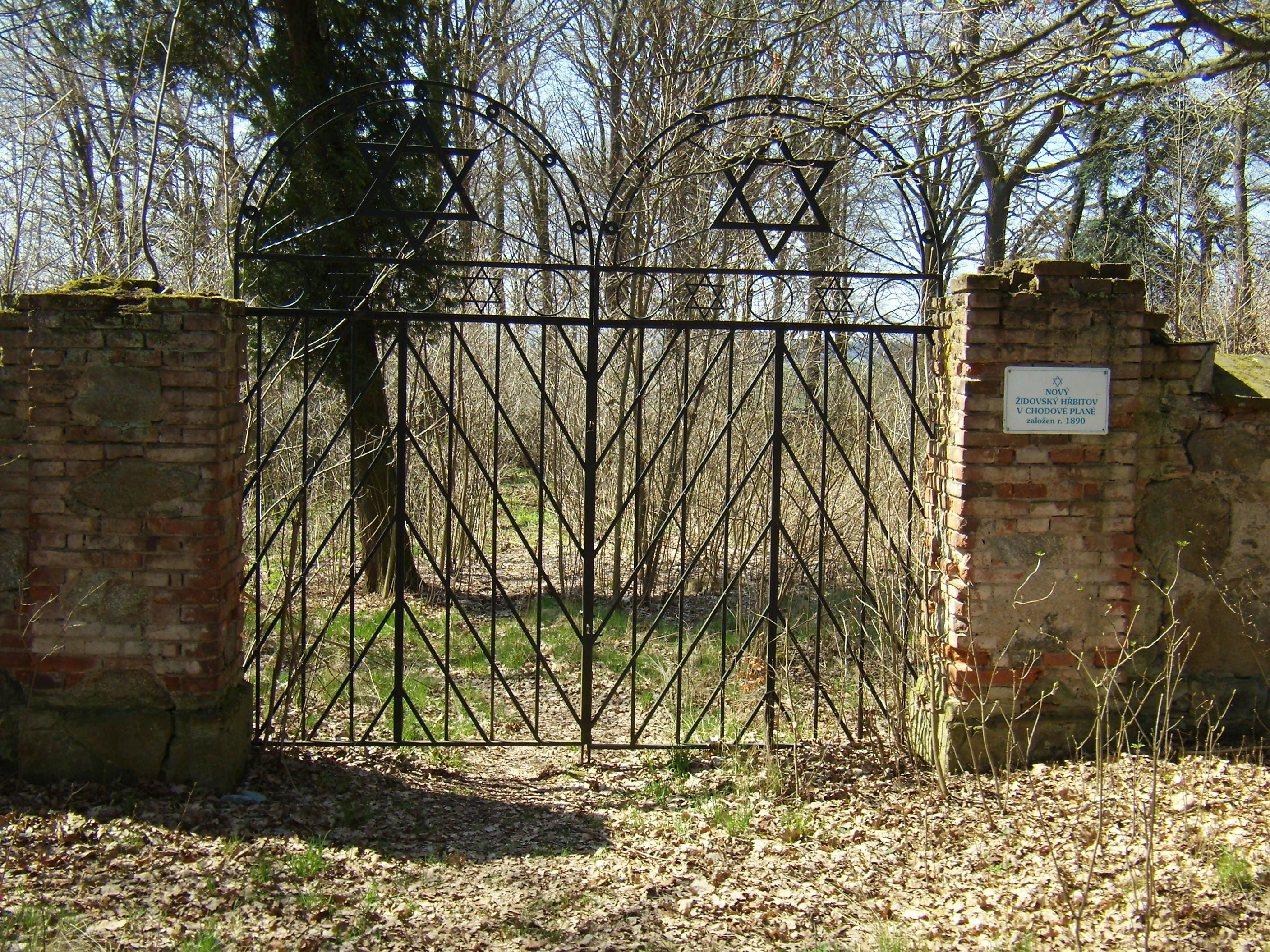 Chodová Planá - nový ŽH